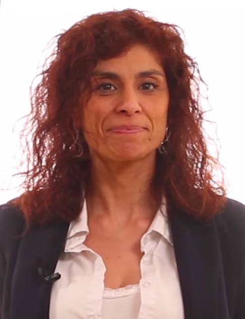 En este vídeo, nuestra diputada Rosana Alonso nos habla de la dificultad de muchas familias españolas para encontrar plazas públicas paras sus hijos e hijas en el primer ciclo de educación infantil.